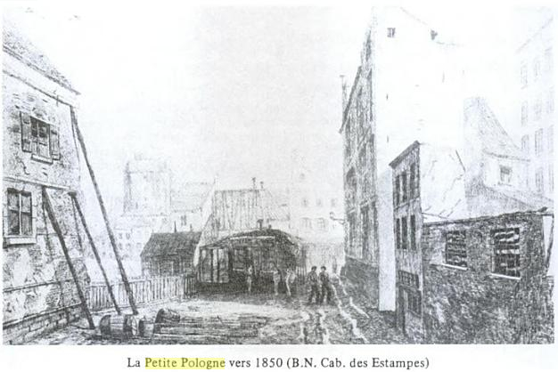 Gravure de la Petite-Pologne (Paris) en 1850